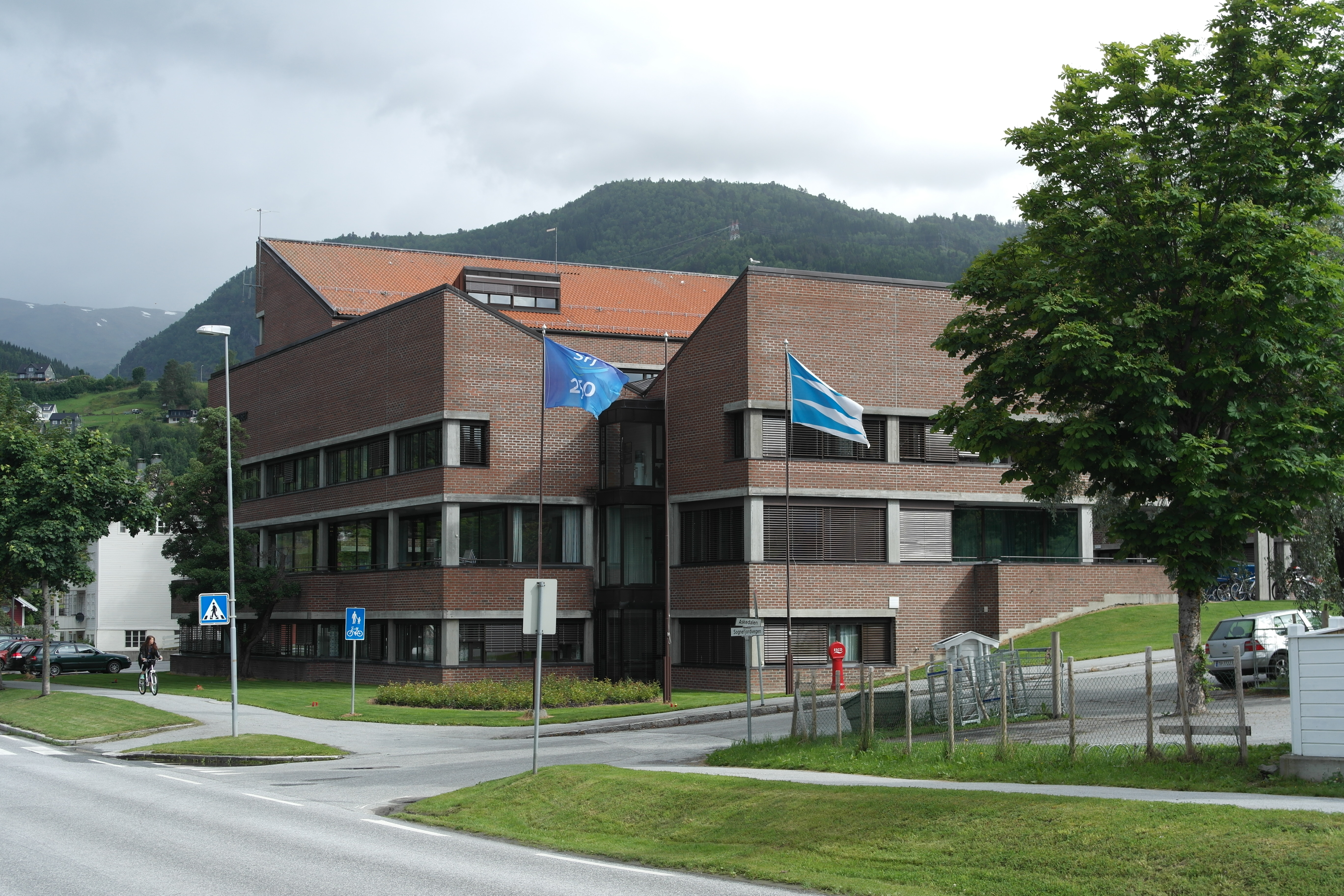 Foto: Sigrun Espe